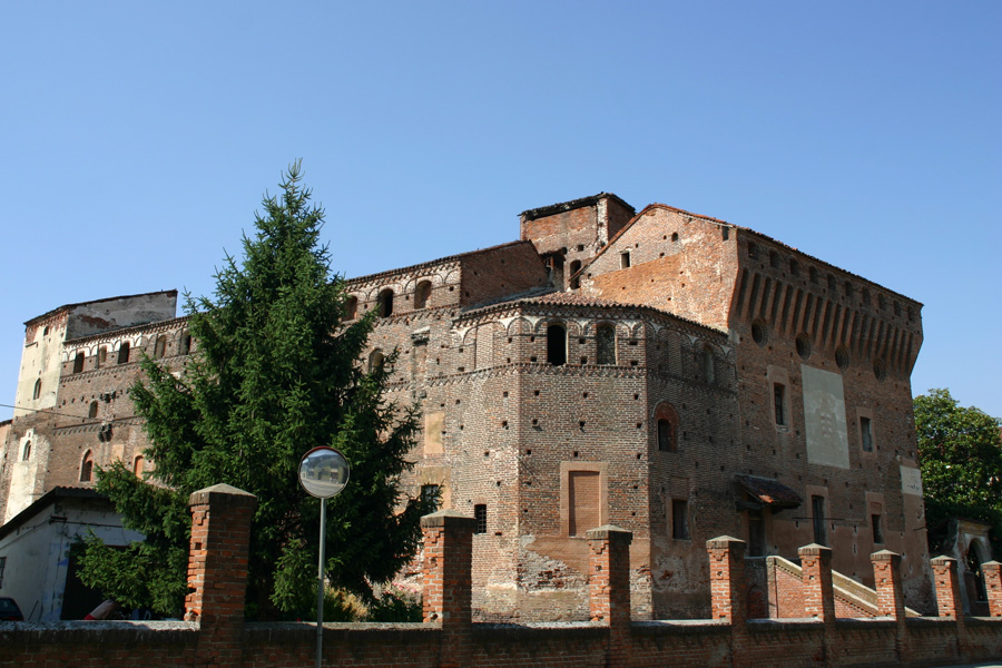 La rocca dei Caccia a Castellazzo Novarese